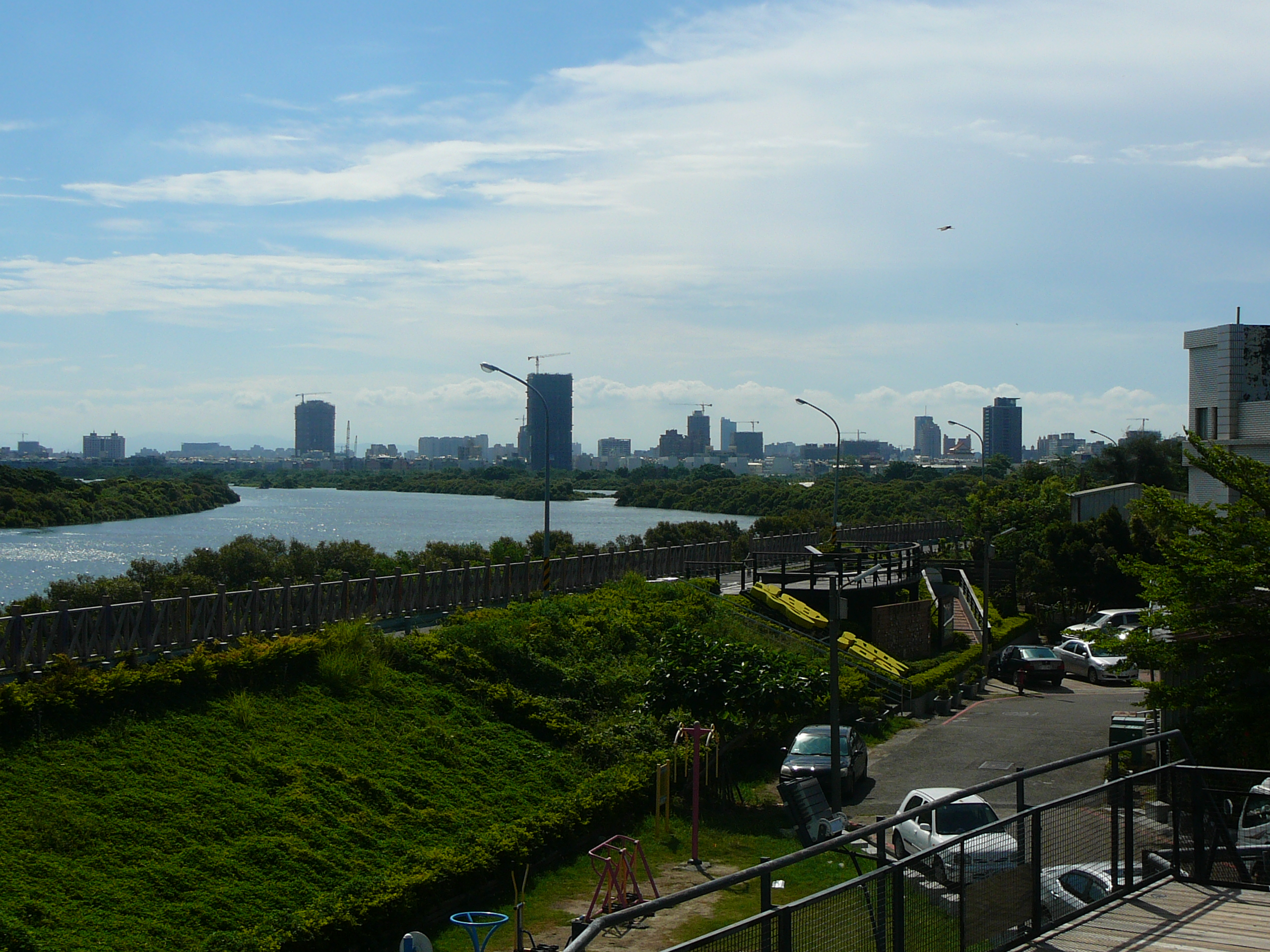 鹽水溪拍照從安平樹屋